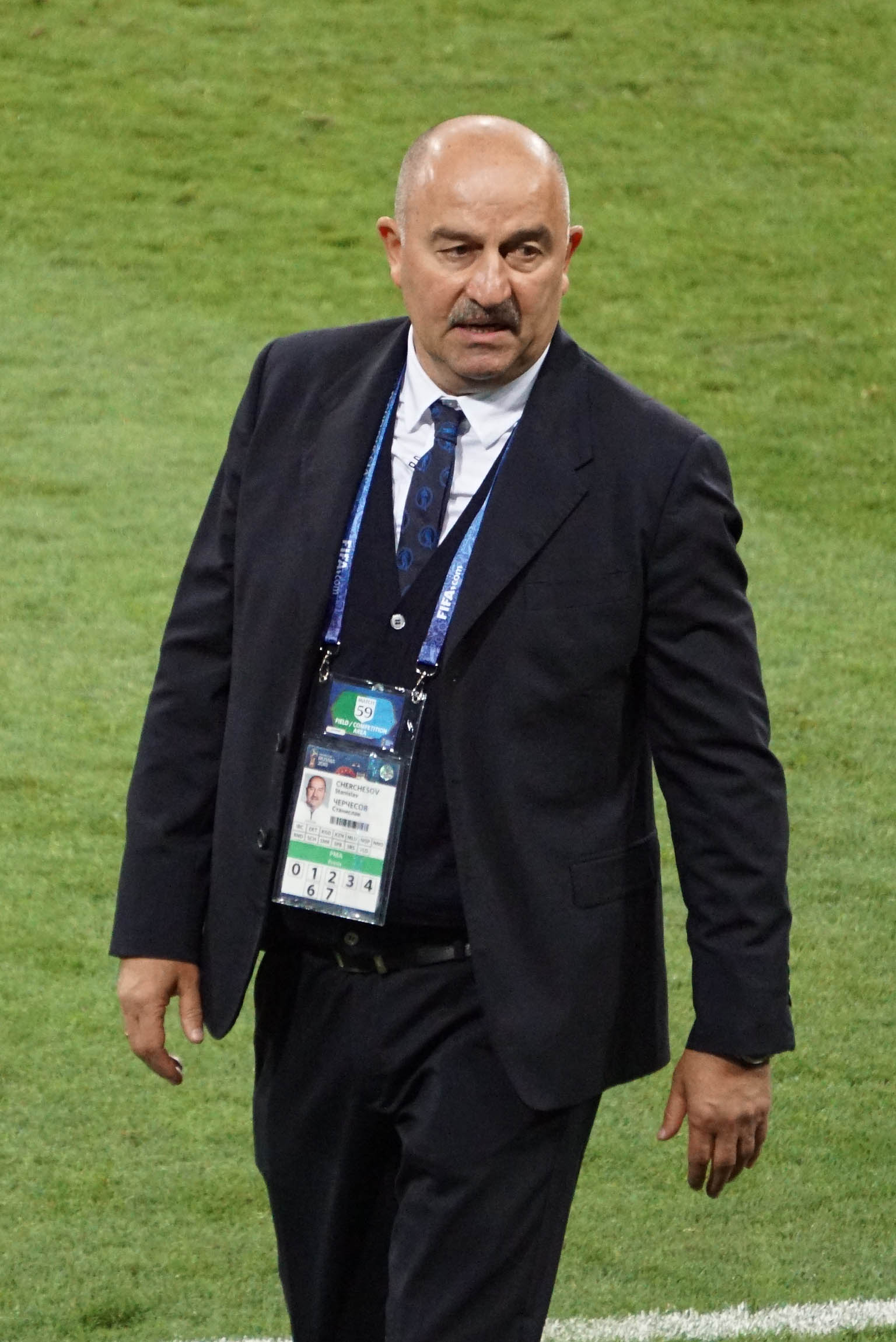 Станисла́в Сала́мович Черче́сов (осет. Черчесты Саламы фырт Станислав; 2 сентября 1963, Алагир, Северо-Осетинская АССР, СССР) — советский и российский футболист, вратарь, российский футбольный тренер. Главный тренер сборной России по футболу. Игрок сборных СССР, СНГ и России. Заслуженный мастер спорта России (2003). 7 июля 2018 года сборная Хорватии обыграла сборную России со счётом 2:2 (4:3) по пенальти на ЧМ-2018 на стадионе «Фишт».